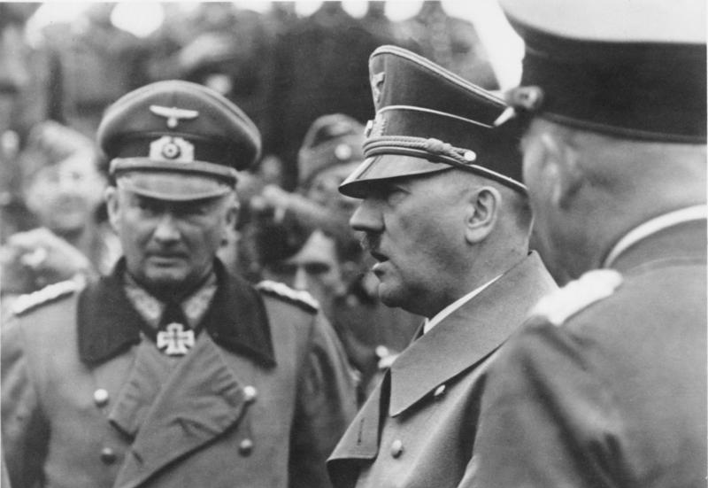 Der Führer besucht seine Truppen in Frankreich